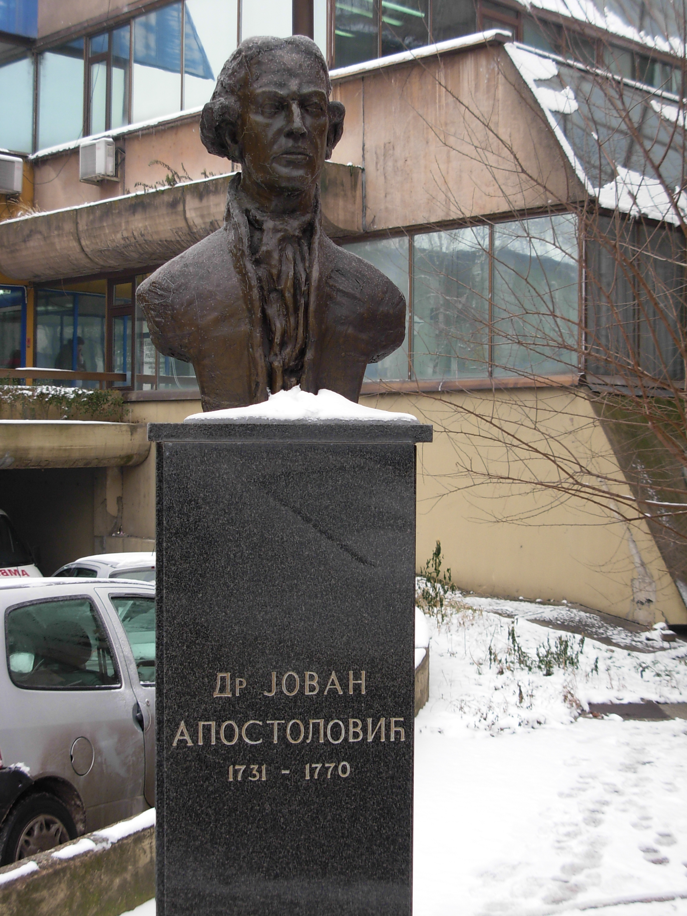 Bista dr Jovana Apostolovića (1731—1770), ispred ulaza u zgradu Pasterovog zavoda u Novom Sadu.